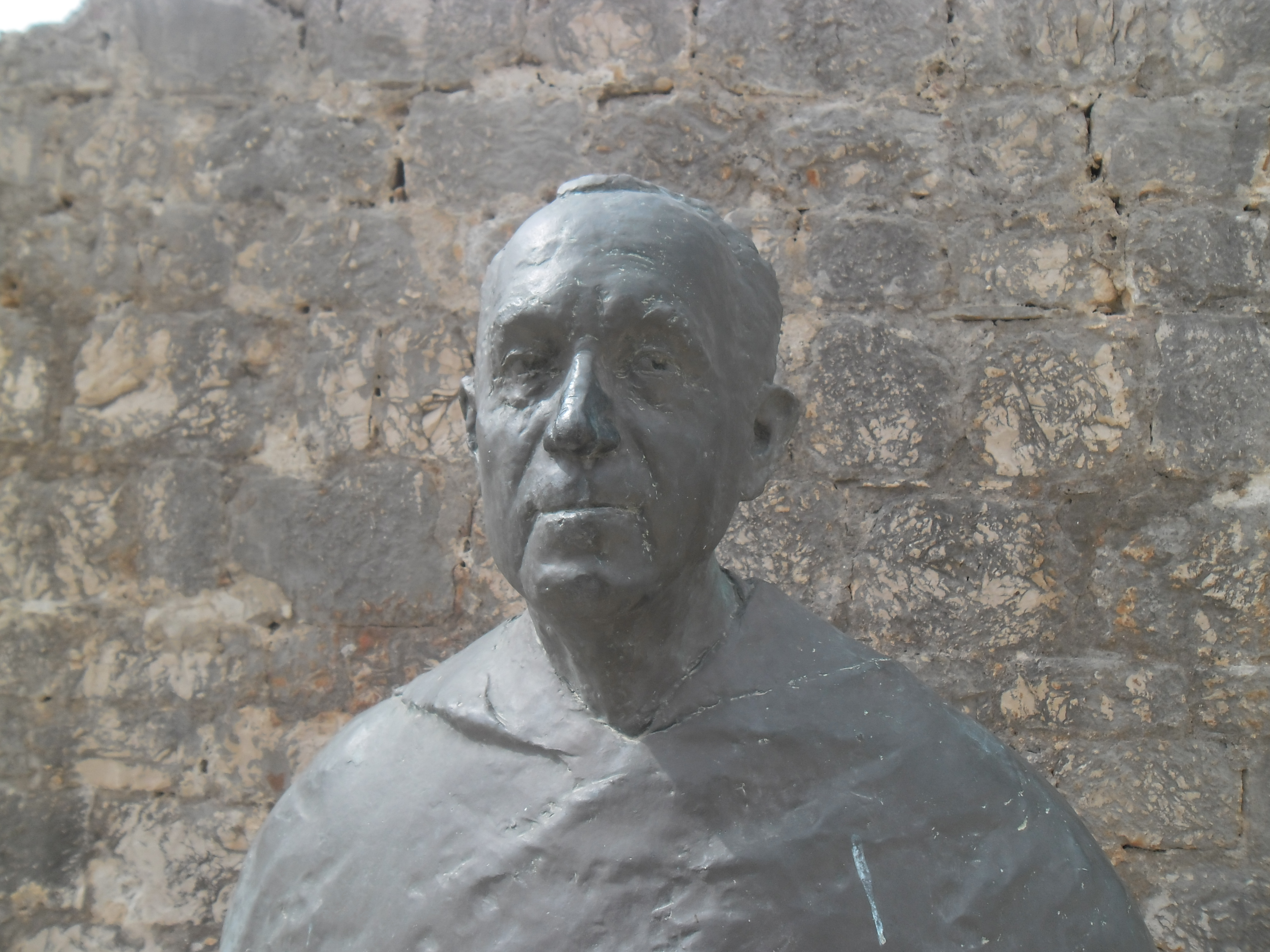 Spomenik Rajmundu Kupareu u Vrboskoj